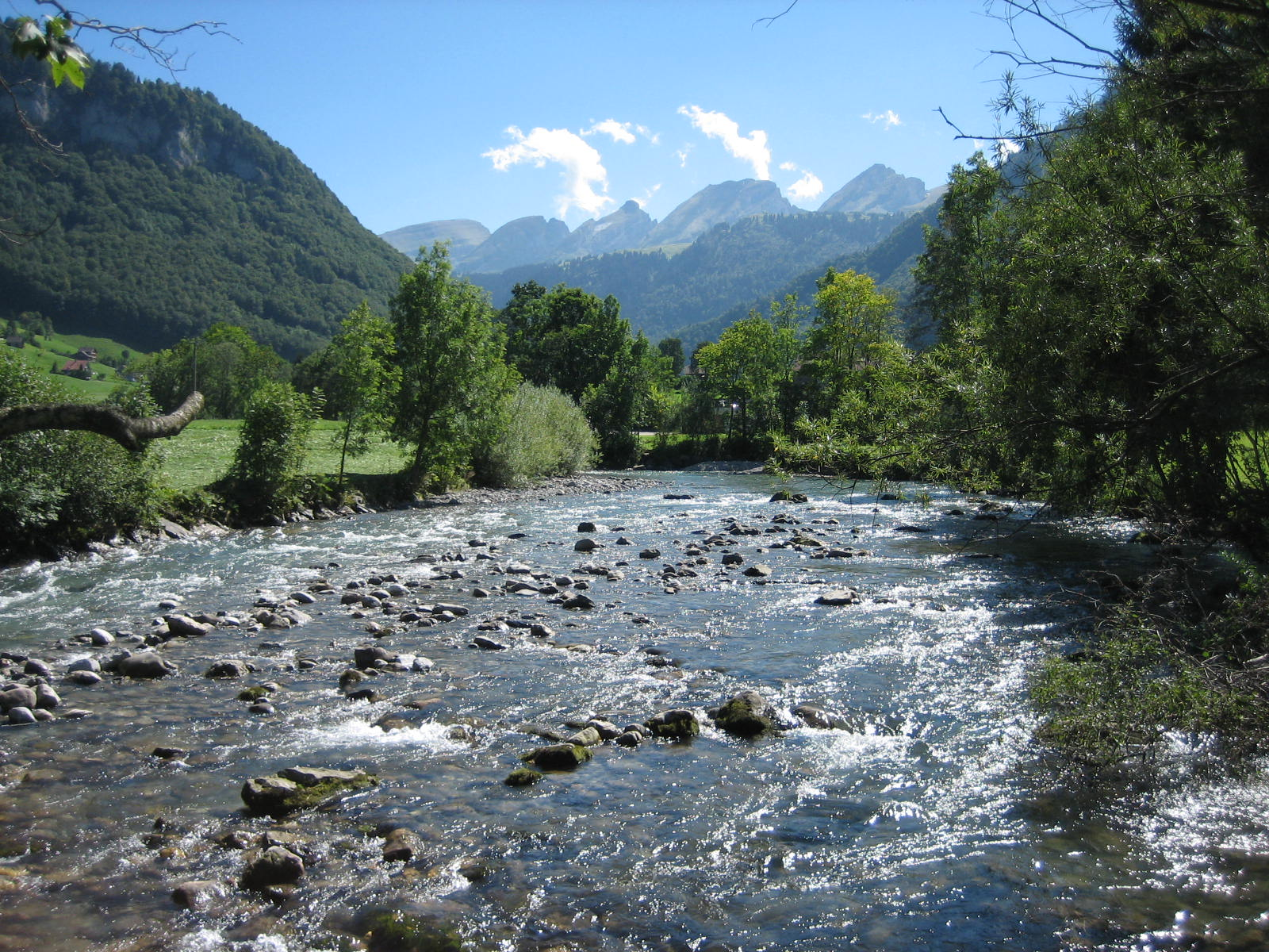 Die Thur im Toggenburg unterhalb von Stein SG